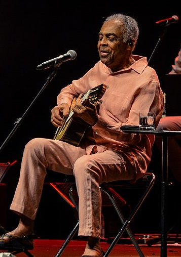 Gil em 2018